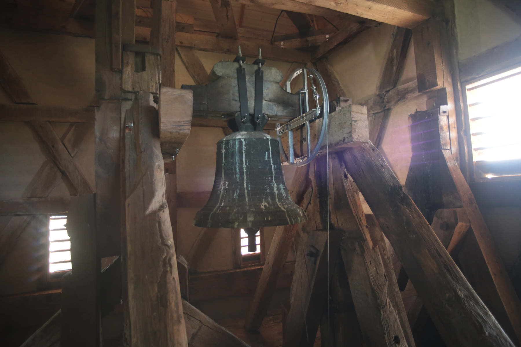 Mit neuer Läuteanlage und alter Aufhängung im mittleren Joch.